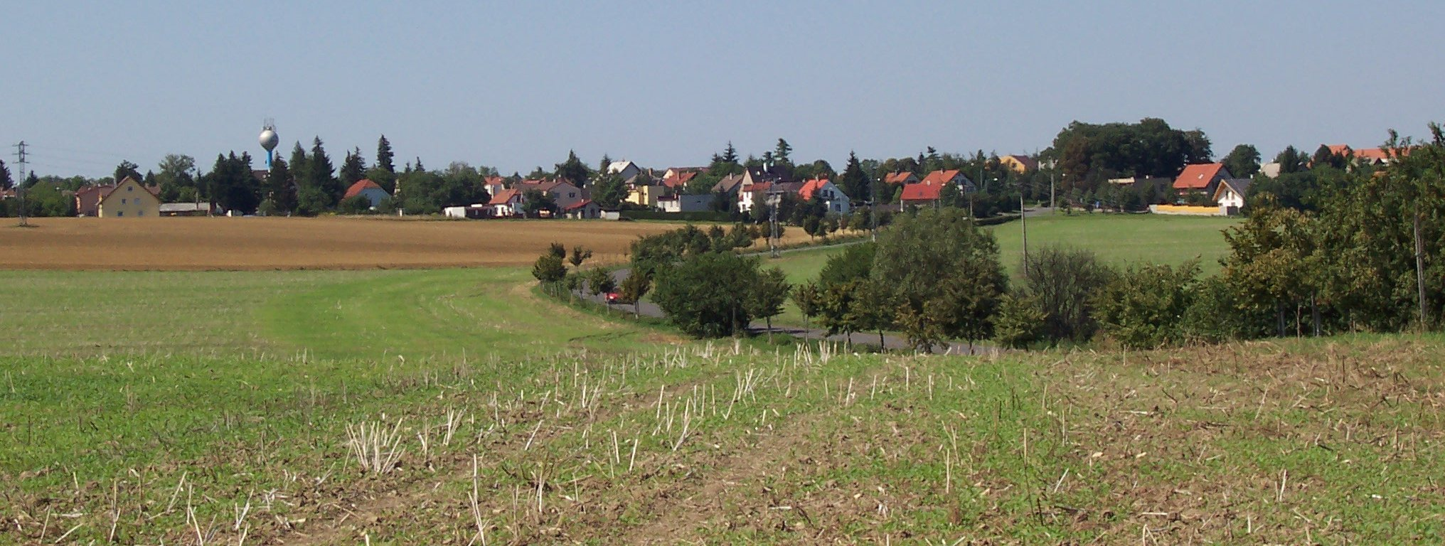 Zeleneč, Česká republika (Zeleneč, Czech Republic)